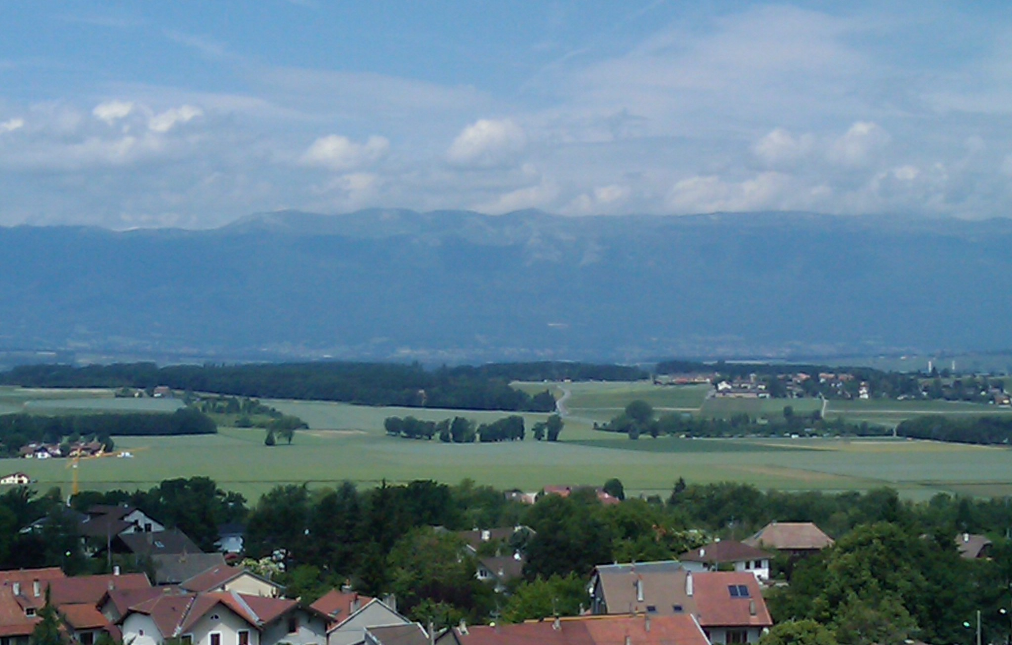 Vue sur le Jura depuis Saint-Julien-en-Genevois